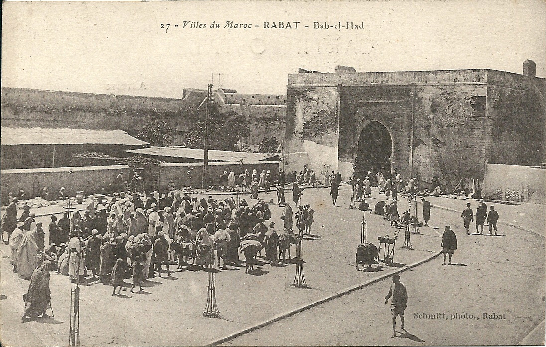 Rabat - Bab-el-Had